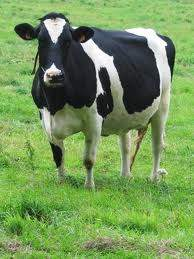 Bos Taurus Hato La Chiquinquira, Sierra de Perija estado Zulia Venezuela